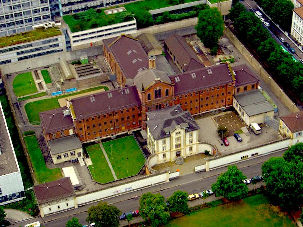 Flugansicht der Strafanstalt.